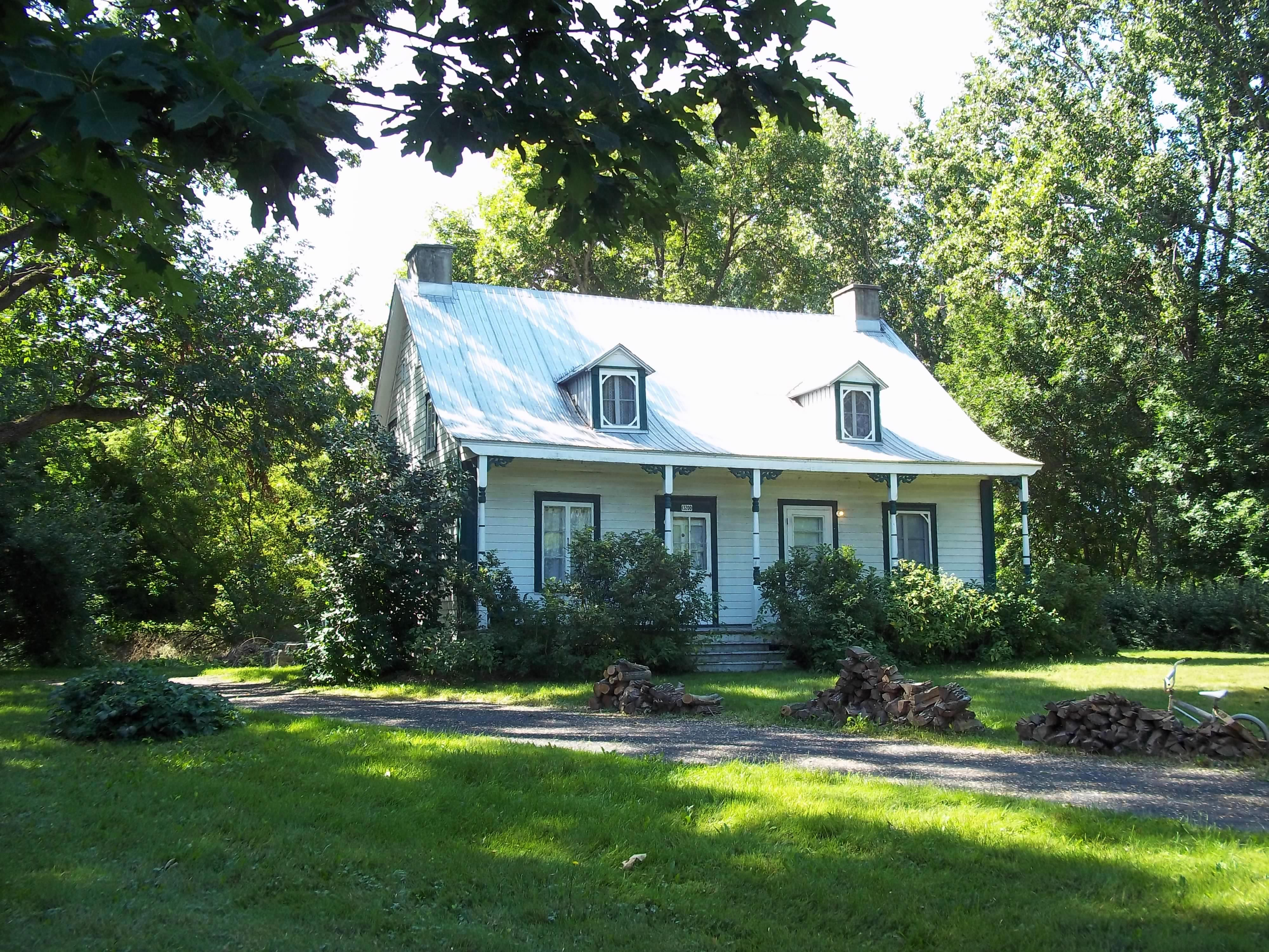 Maison Bleau, 13 200, boulevard Gouin Est, Montréal. Acquise par la Ville de Montréal, elle est intégrée au Parc-nature de la Pointe-aux-Prairies. Cette petite maison de ferme, lambrissée de bois, est située sur une terre occupée, de 1721 à 1981, par sept générations successives de la famille Bleau. La maison actuelle aurait été érigée vers 1890 sur les fondations d'une précédente maison construite en 1732 par Laurent Bleau qui avait acquis cette terre de 60 arpents, en 1721, de Toussaint Hunault. La Communauté urbaine de Montréal s'est portée acquéreur de cette propriété, en 1981, en vue de l'intégrer au parc régional. (Grand répertoire du patrimoine bâti de Montréal)